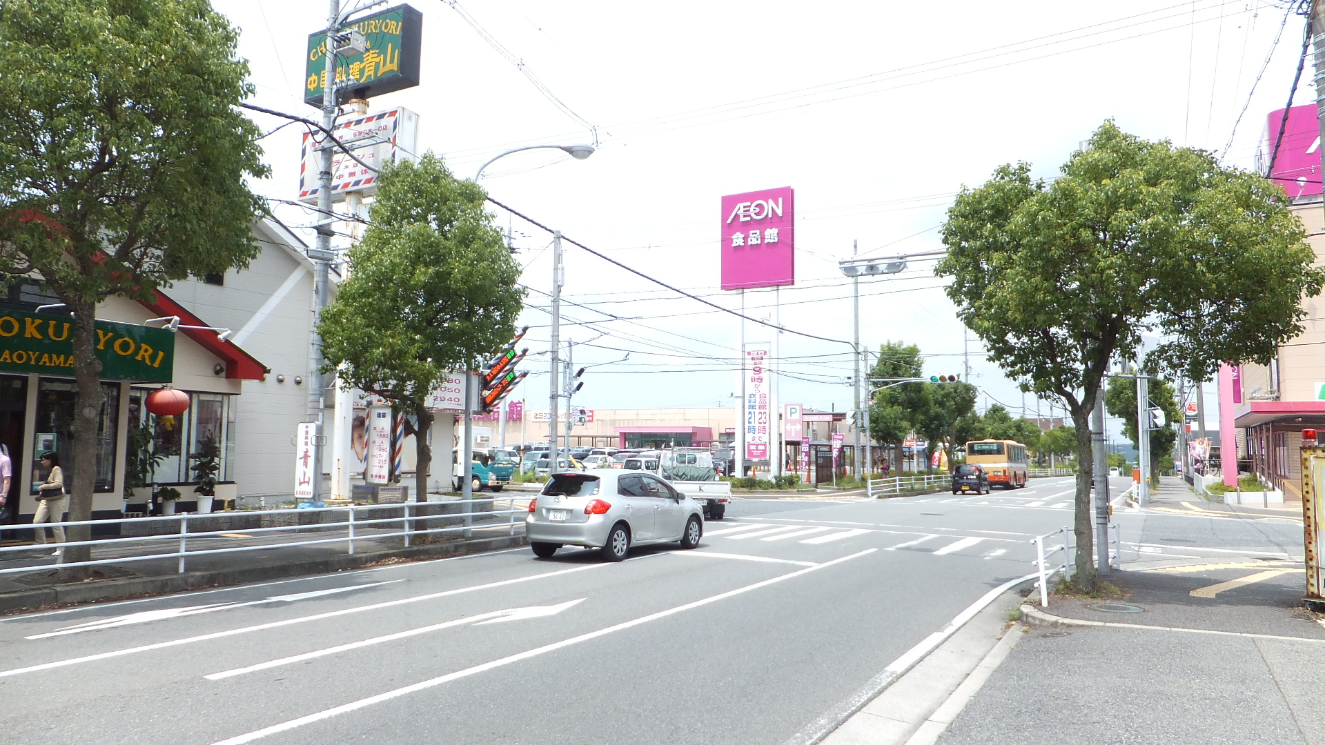 兵庫県三木市志染町青山6丁目